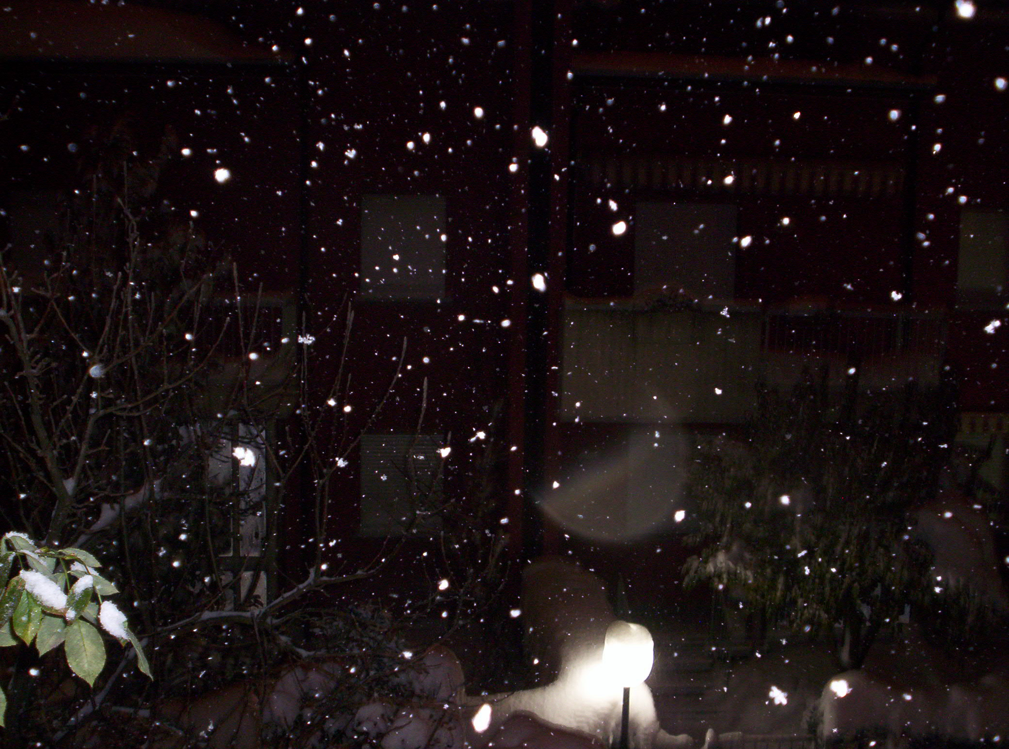 Tormenta nevosa a Imola;Bologna